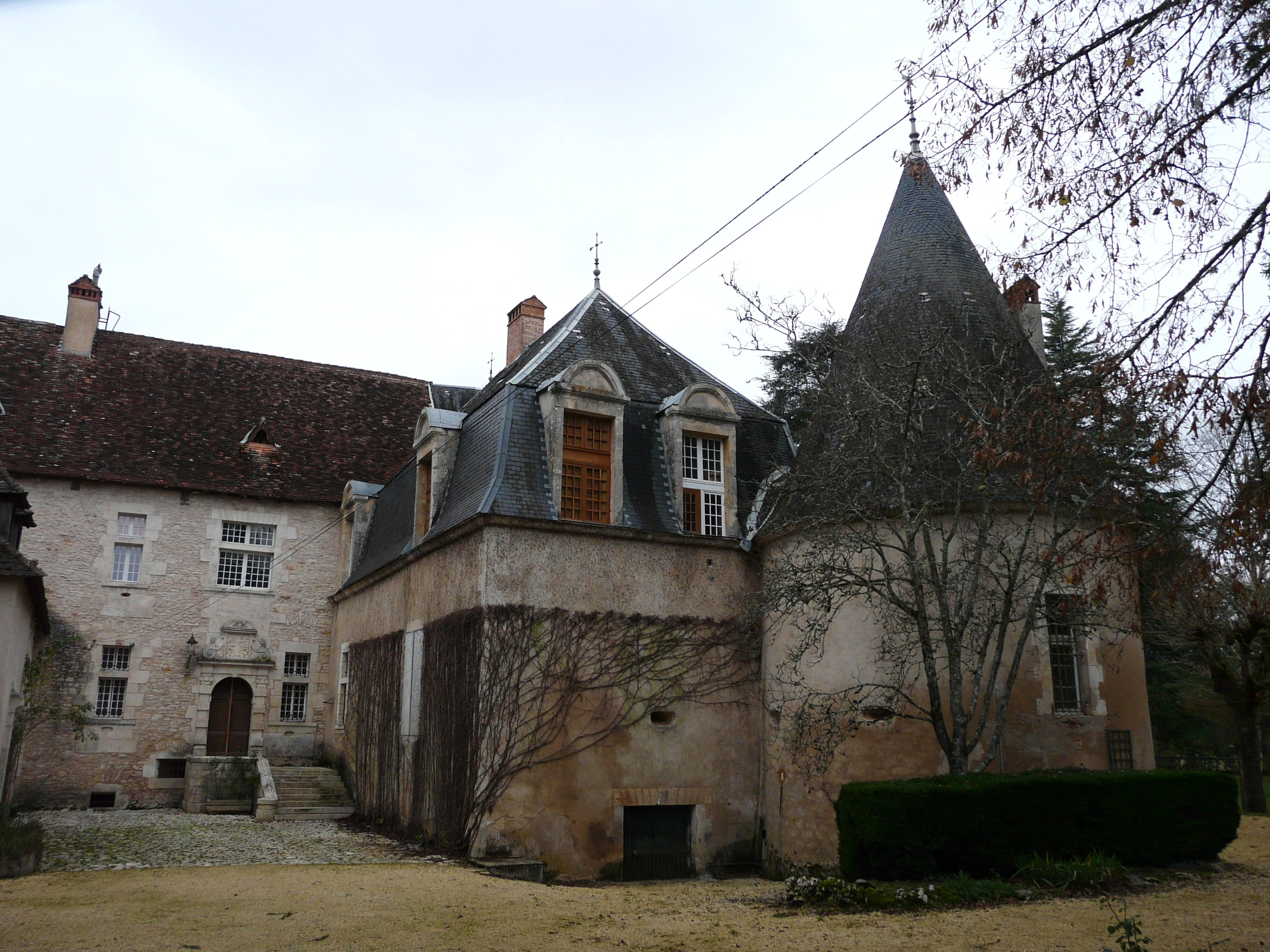 Le château de la Sudrie, Cubjac, Dordogne, France.